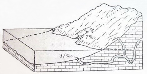 Srpski (latinica): Grafik vrela 1.